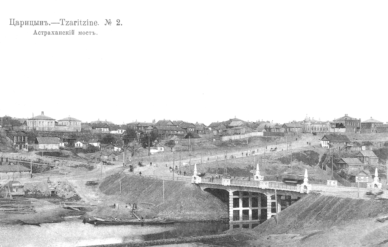 Астраханский мост (Царицын, Россия)